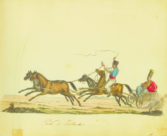 Poste de Vallachie